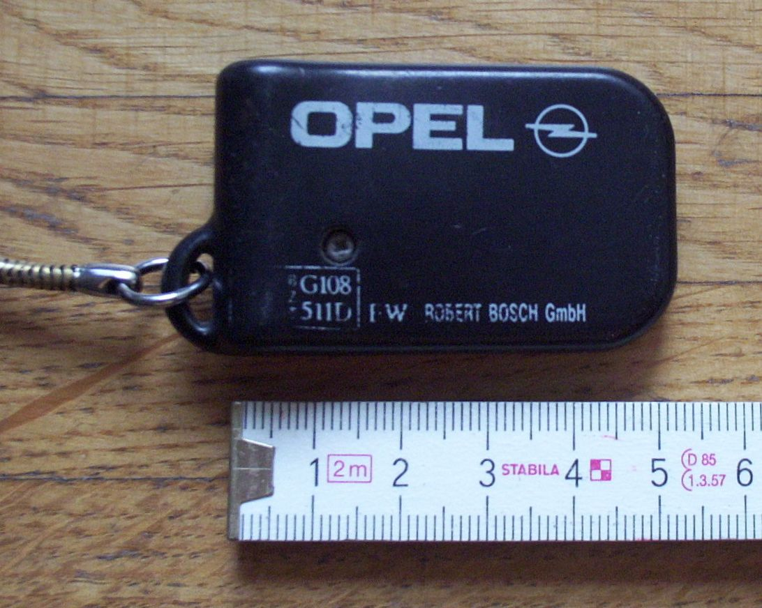 Bildbeschreibung: Fernbedienung fuer Wegfahrsperre/Zentralverriegelung (Pkw Bj. 1994) Quelle: selbst photographiert Fotograf/Zeichner: Montauk Datum: 19. Mai 2006